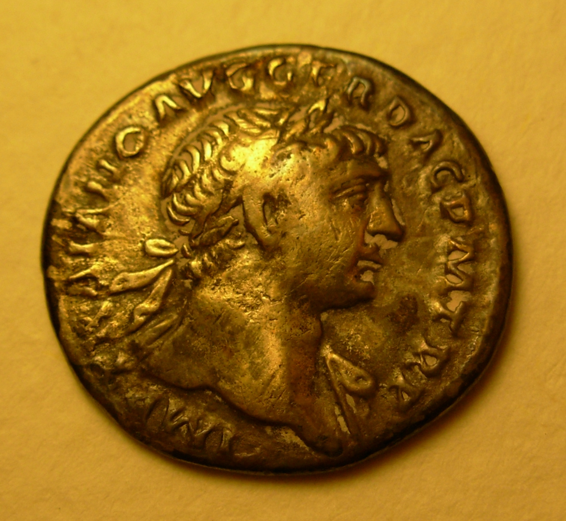 Moneta d'argento dell'Imperatore Traiano. Fronte